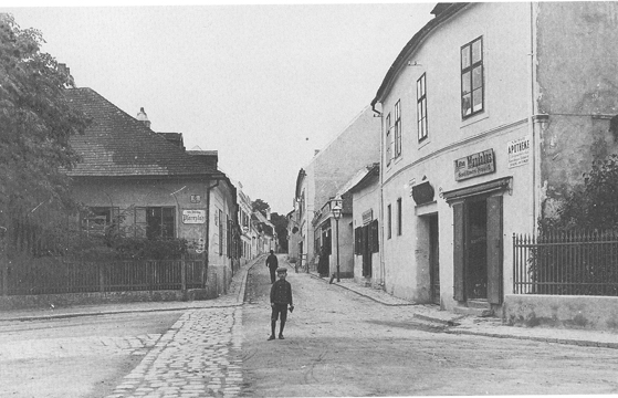 Probusgasse seen from Pfarrplatz in Heiligenstadt, Vienna.